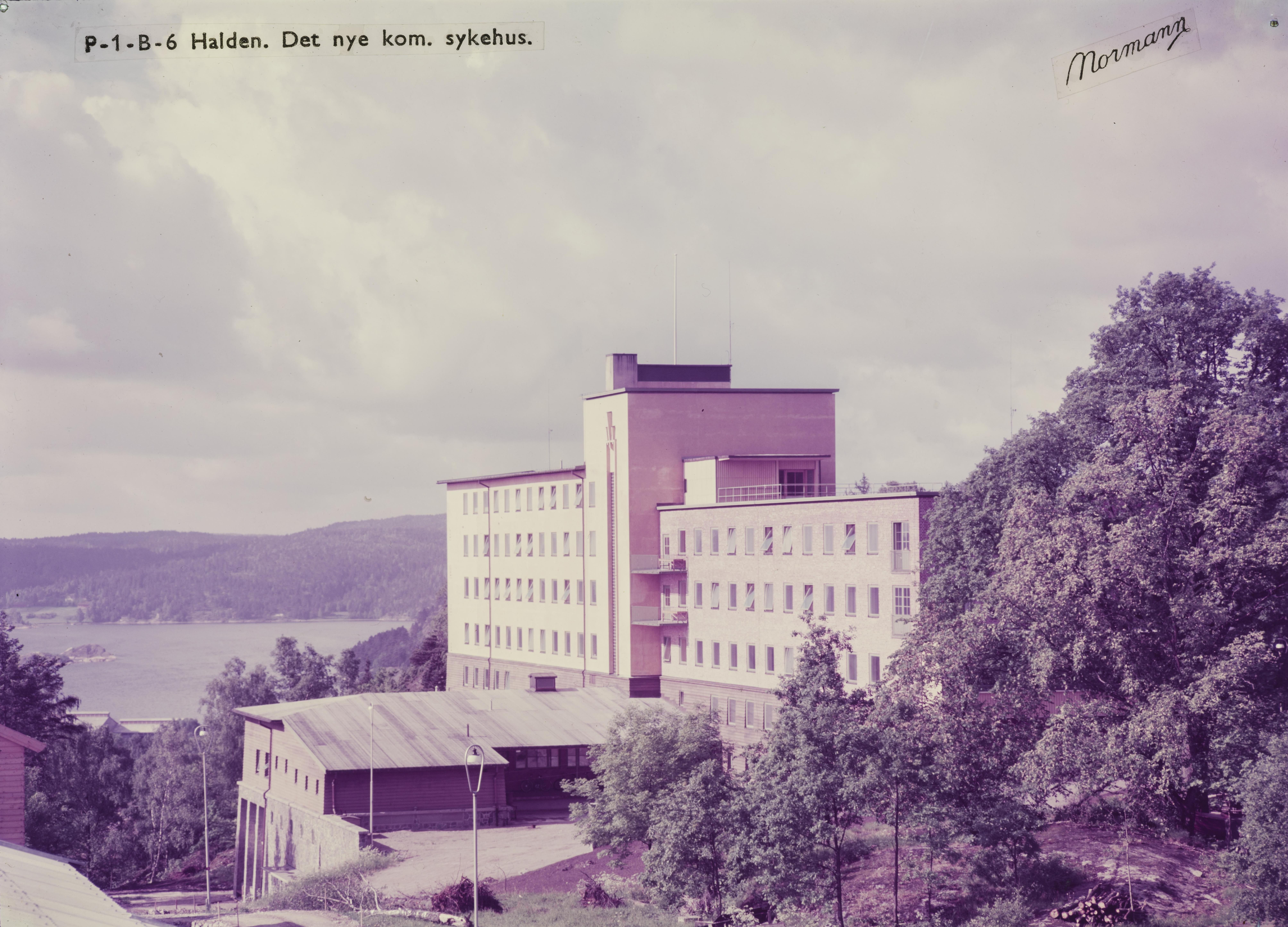 Bildet er hentet fra Nasjonalbibliotekets bildesamling. Anmerkninger til bildet var: Tittel er hentet fra emballasje. Halden, Østfold